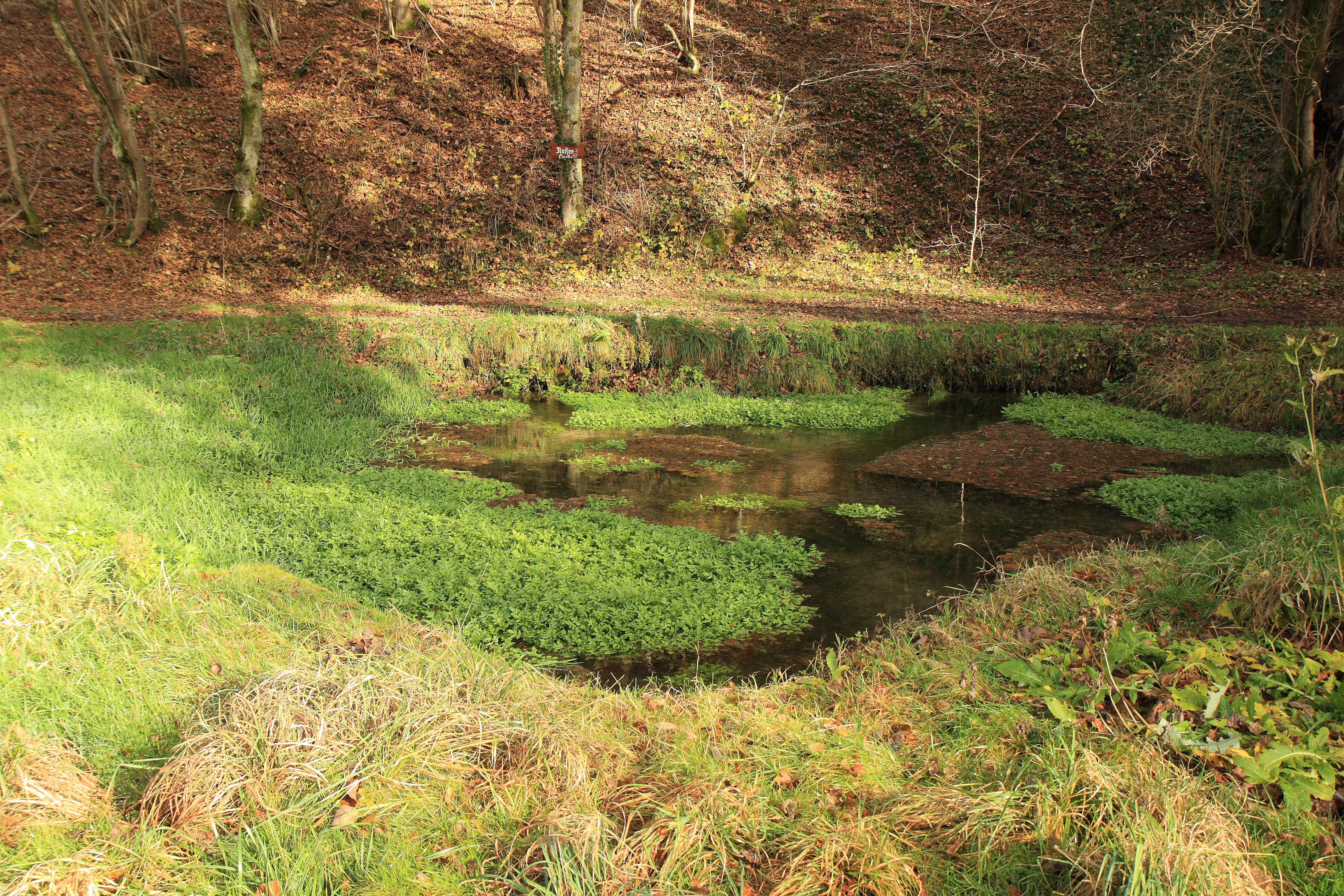 Der Quelltopf der Naifer